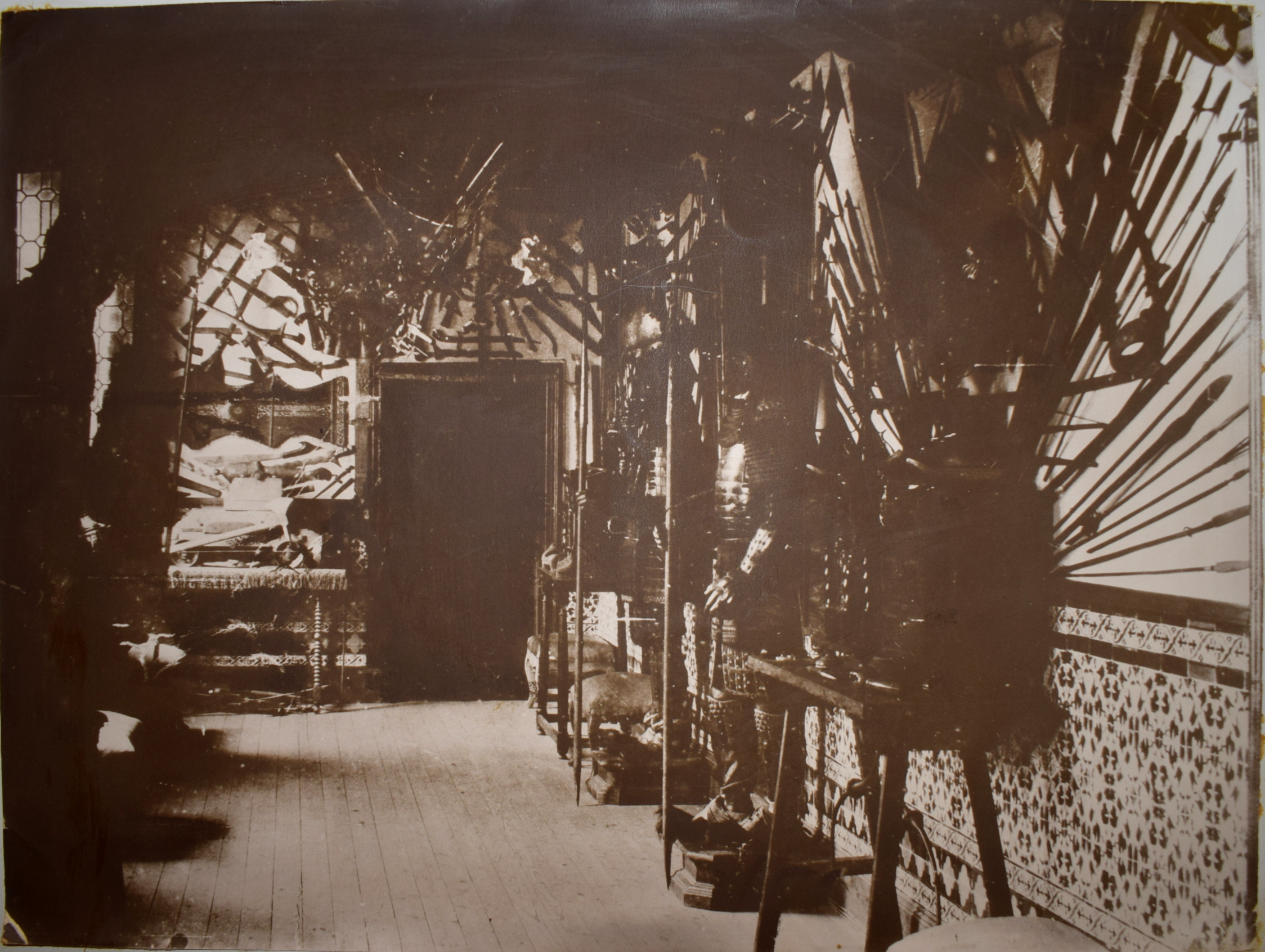 Detalle de panel explicativo sobre el coleccionismo realizado por el Museo Provincial de Ávila, reproduciendo una fotografía sobre la colección de armas de Bernardino Melgar y Abreu en su palacio.